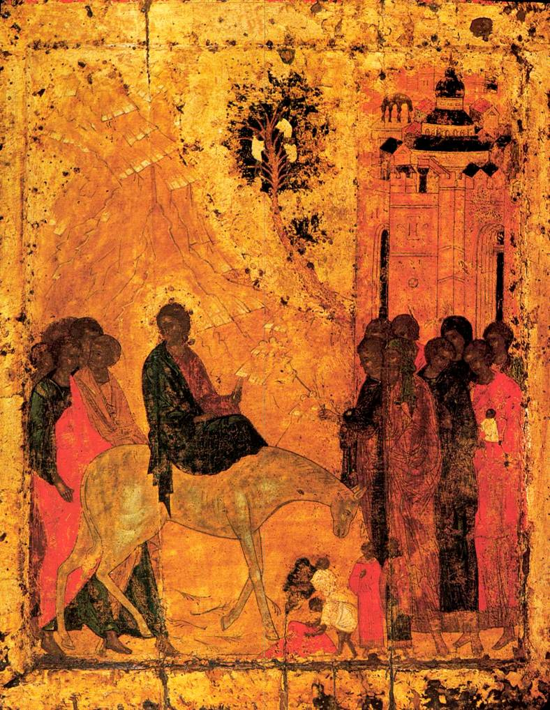 Вход в Иерусалим Из праздничного чина Школа или худ. центр: Москва Начало XV в. (1410-е гг.?) 81 × 63 см Благовещенский cобор Московского Кремля, Москва, Россия Инв. 3247 соб/ж-1400 Из праздничного яруса иконостаса собора.